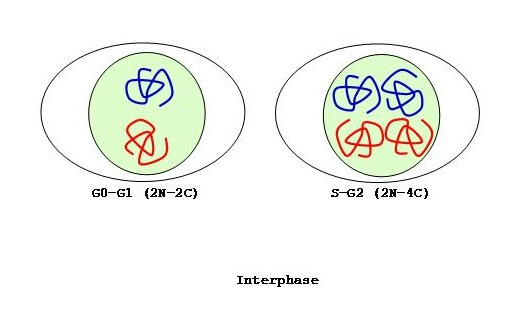 Description: La réplication des chromosomes pendant la phase S de l'interphase du cycle cellulaire. Source: Dessin original. Auteur: Michel Hamels Cette image est: librement diffusable à titre commercial ou non librement modifiable et l'image modifiée est elle-même librement modifiable et diffusable à titre commercial ou non. Michel Hamels 18 août 2006 à 17:00 (CEST)